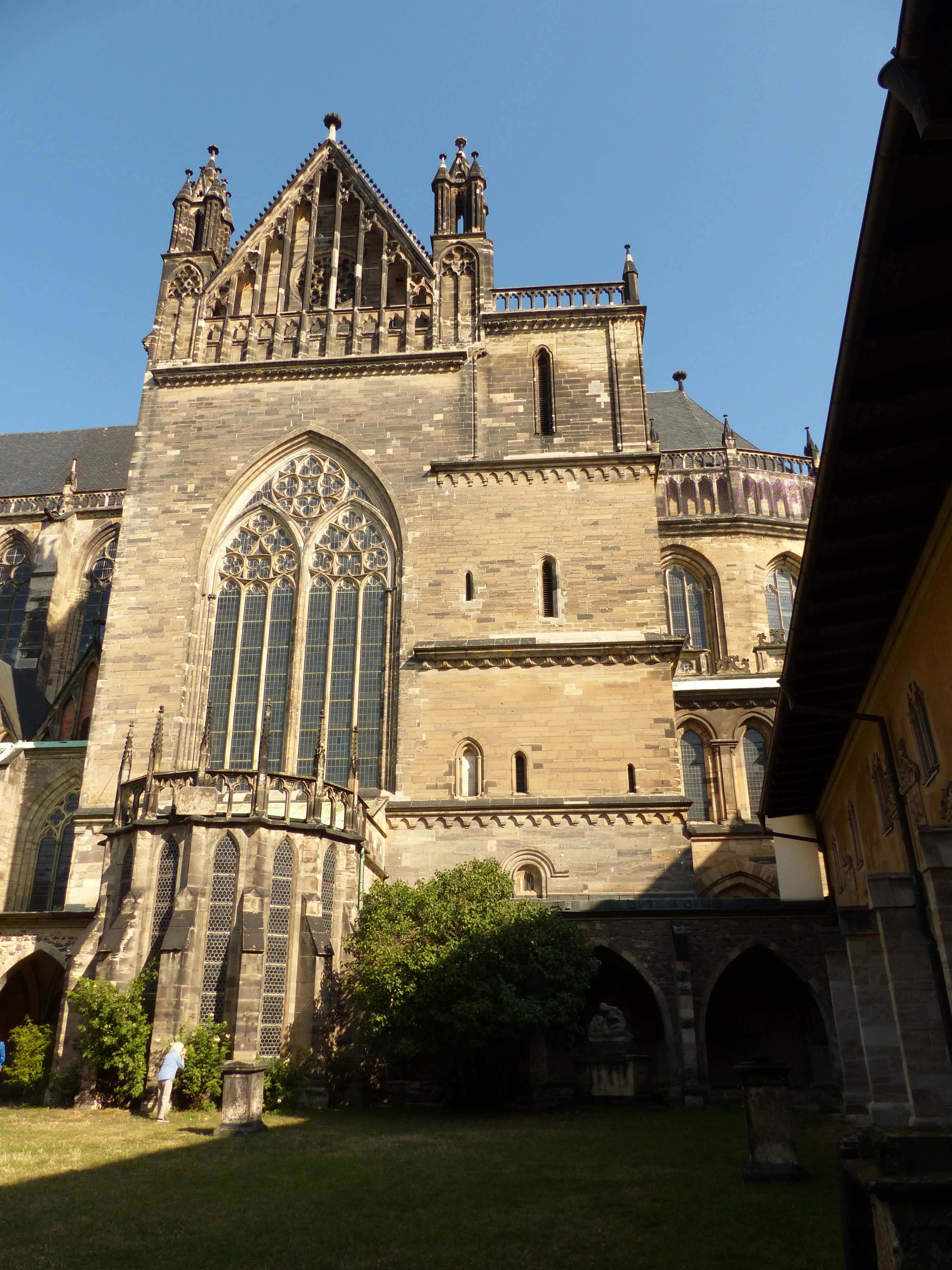 Südl. Querhausgiebel und Chorturm des Magdeburger Doms vom Kreuzgang gesehen